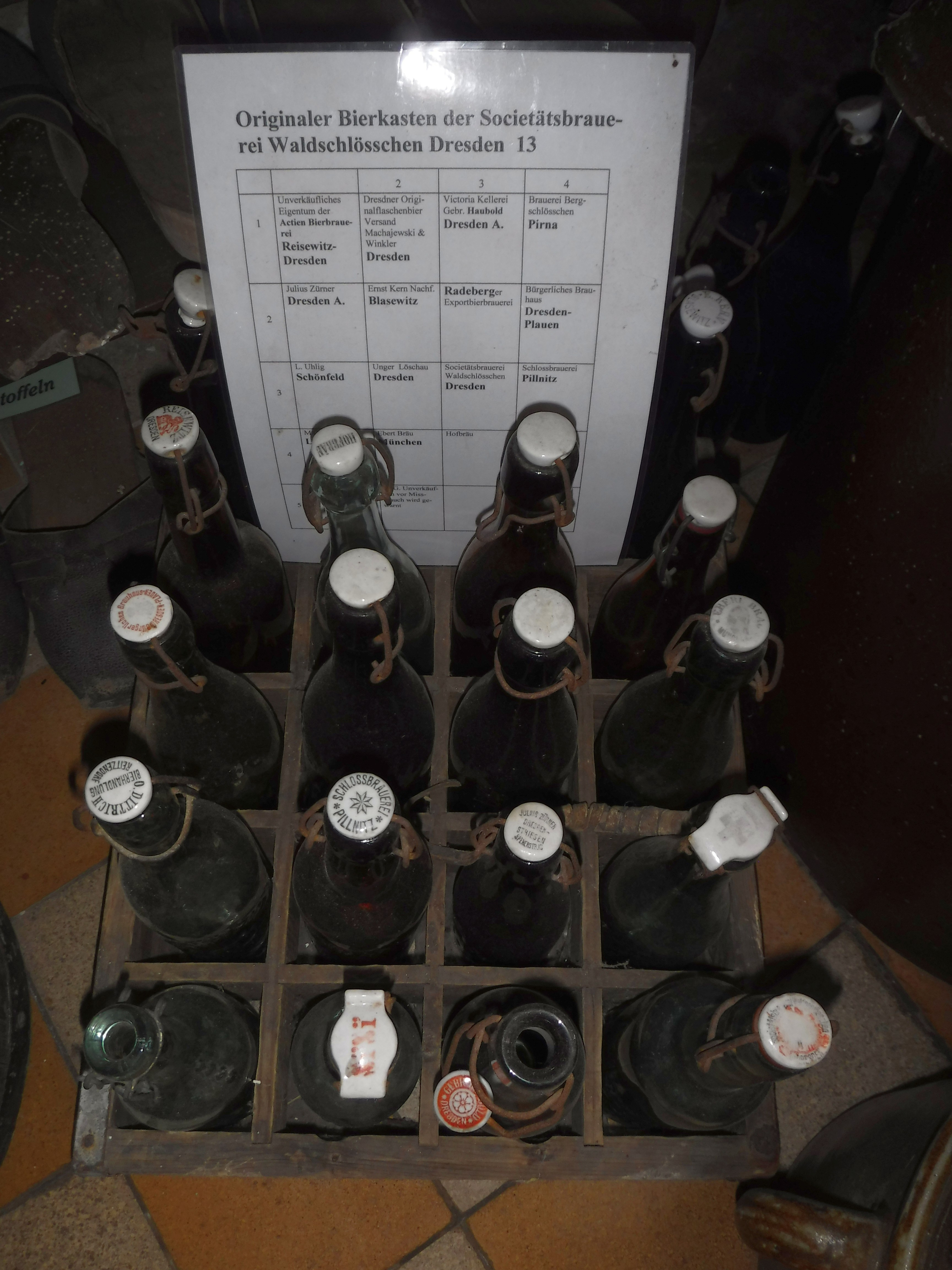 Bierkasten der Societätsbrauerei Waldschlösschen Dresden 13 im Kleinbauernmuseum Dresden-Reitzendorf Actien Bierbrauerei Reisewitz Dresden Dresdner Originalflaschenbier Versand Machajewski & Winkler Dresden Victoria Kellerei Gebr. Haubold Dresden Brauerei Bergschlösschen Pirna Julius Zürner Dresden A. Ernst Kern Nachf. Blasewitz Radeberger Exportbierbrauerei Bürgerliches Brauhaus Dresden-Plauen L. Uhlig Schönfeld Unger Löschau Dresden Societätsbrauerei Waldschlösschen Dresden Schlossbrauerei Pillnitz Ebert Bräu München Hofbräu